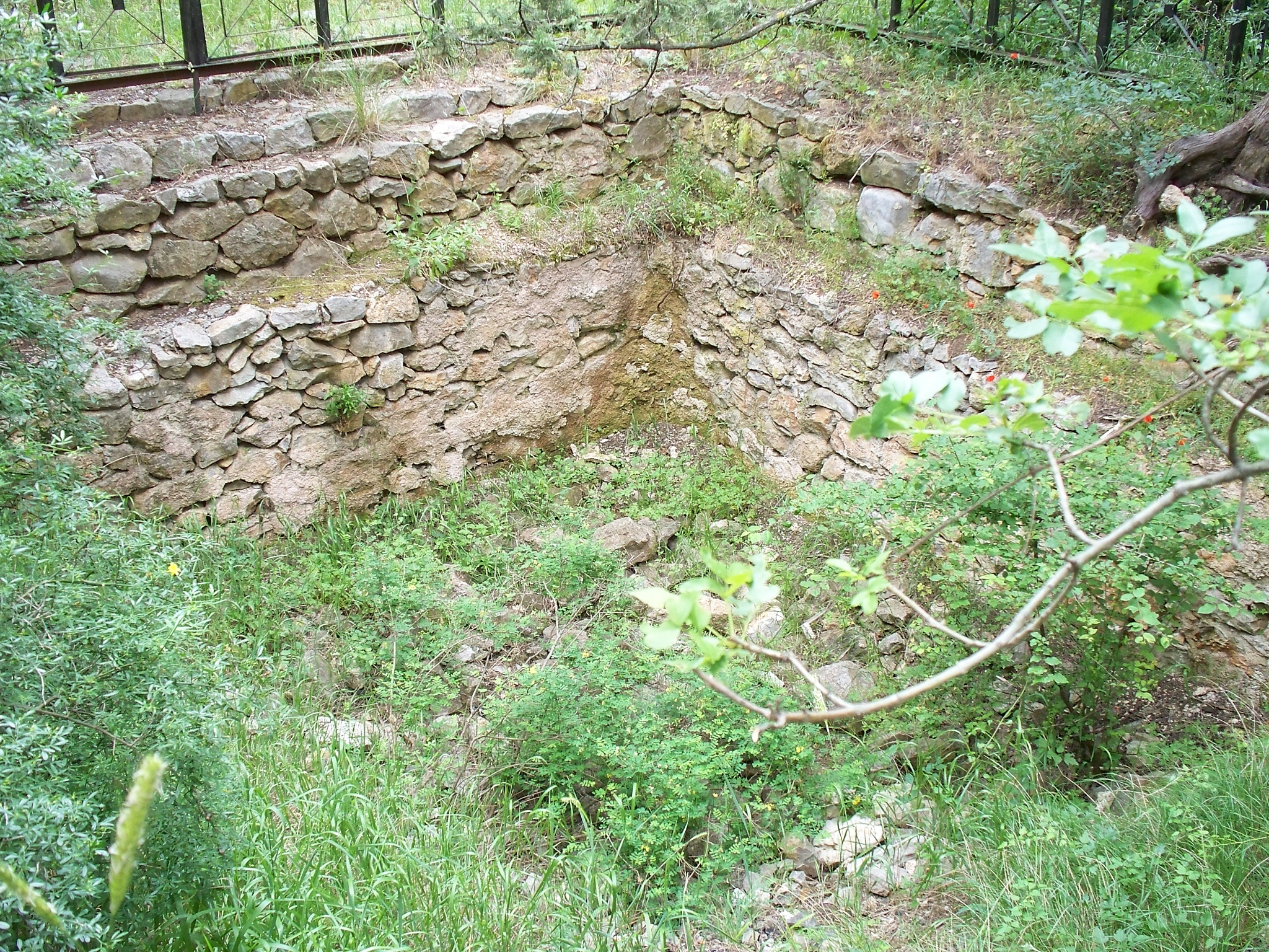 Археологічний комплекс «Фортеця Харакс» та некрополь, Гаспра, мис Ай-Тодор, територія санаторію «Дніпро» та Ай-Тодорського маяка гідрографічної служби ЧФ